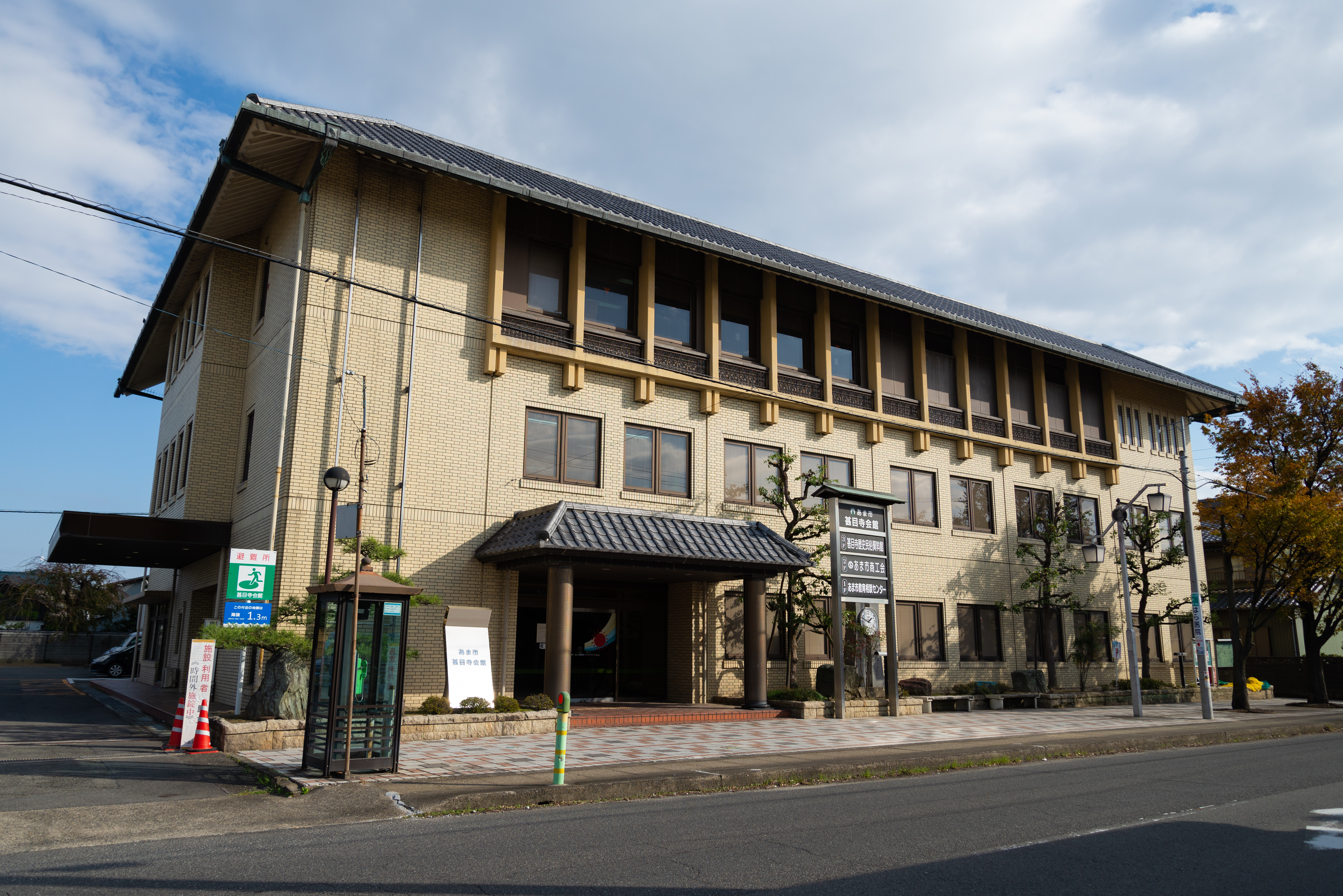 愛知県あま市にある甚目寺産業会館